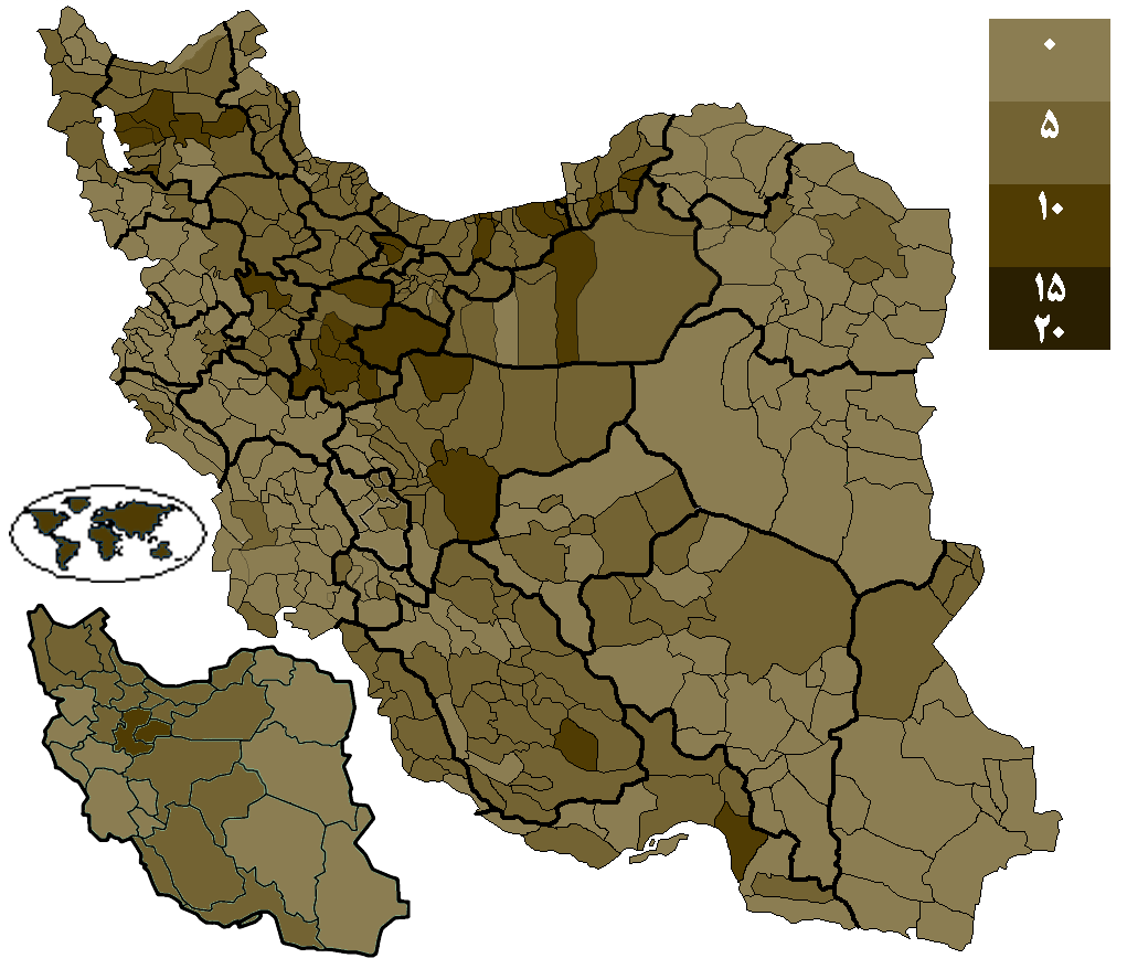 درصد رای علی‌اکبر ولایتی انتخابات ریاست‌جمهوری ایران (۱۳۹۲) به تفکیک شهرستان بر پایهٔ Provinces of Iran